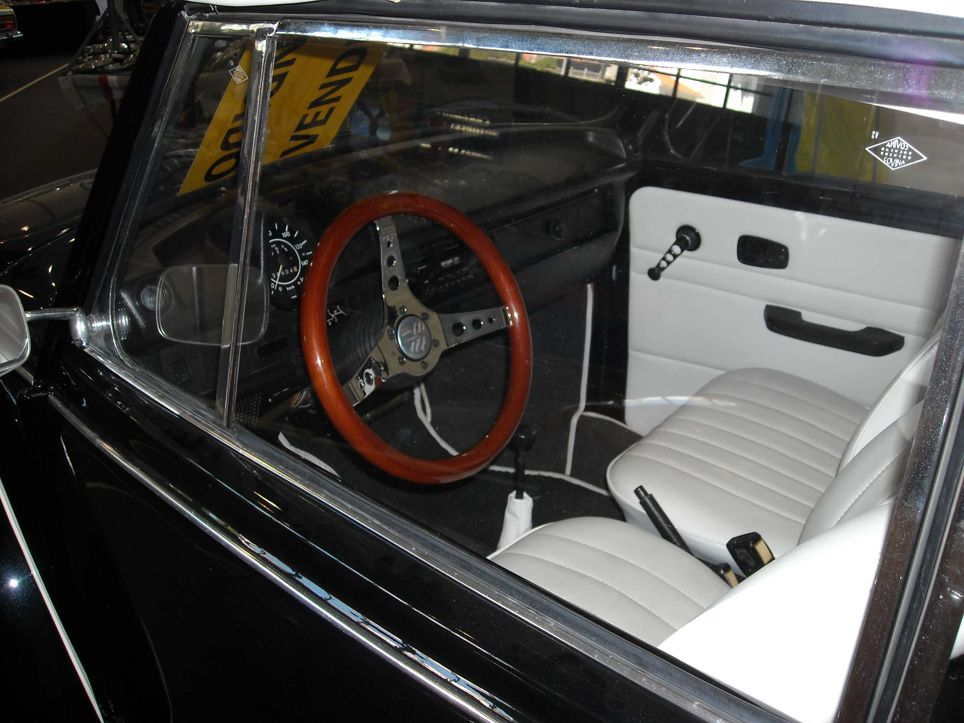 Motorshow, Caramulo, autos clásicos, septiembre 2008